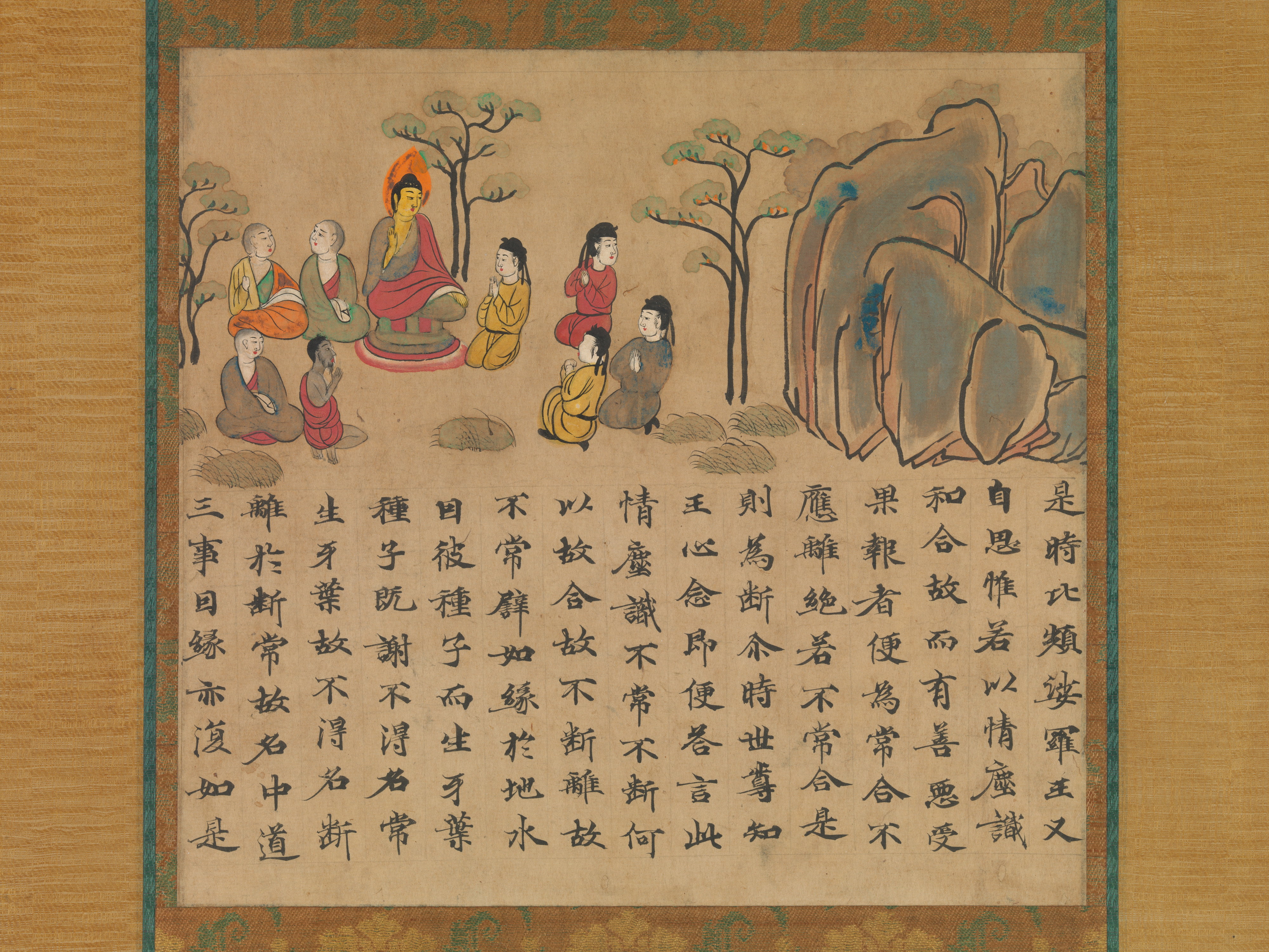 Japan; Hanging scroll; Paintings